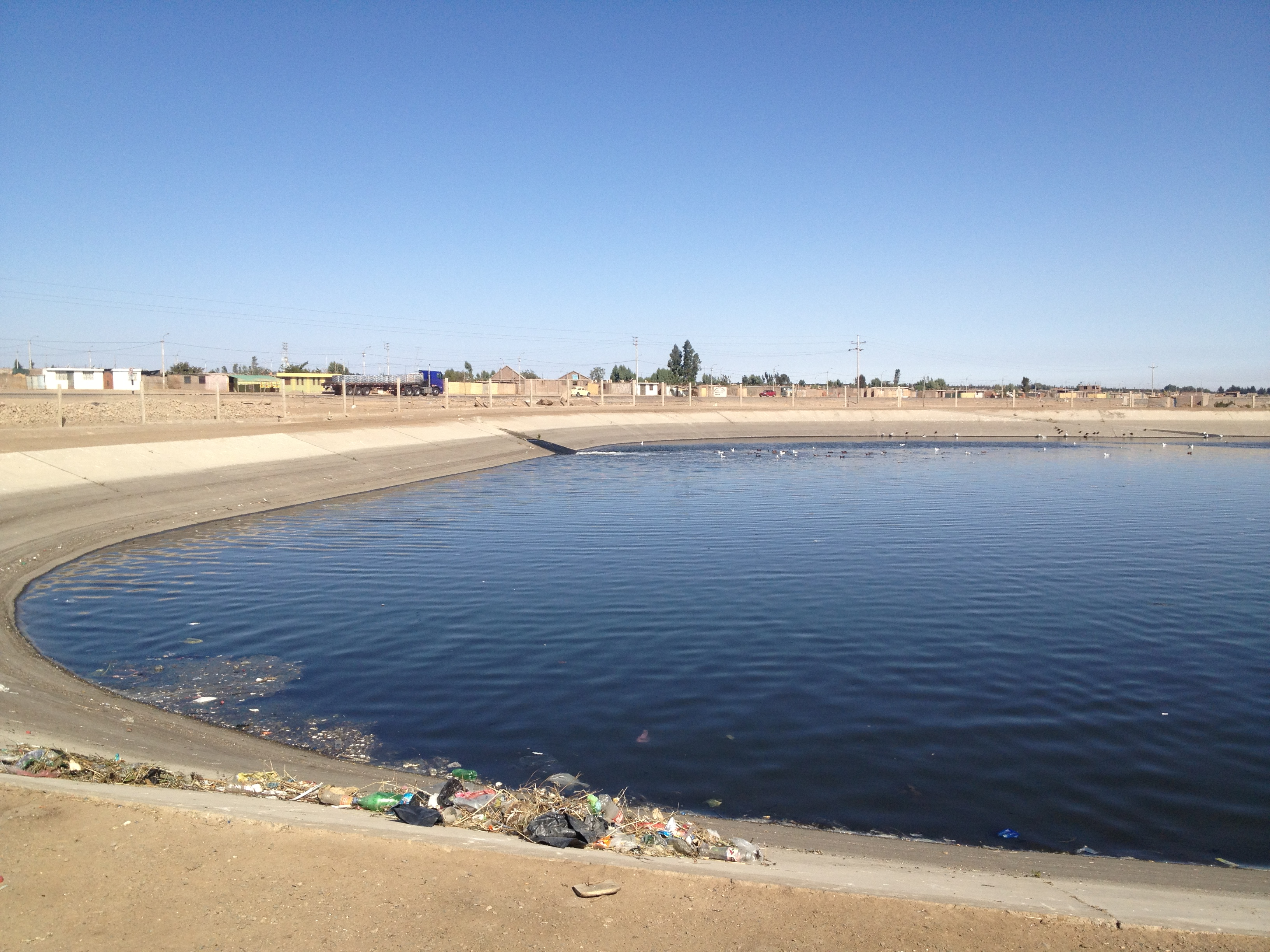 Vaso Regulador, Asentamiento 5, San Camilo, La Joya